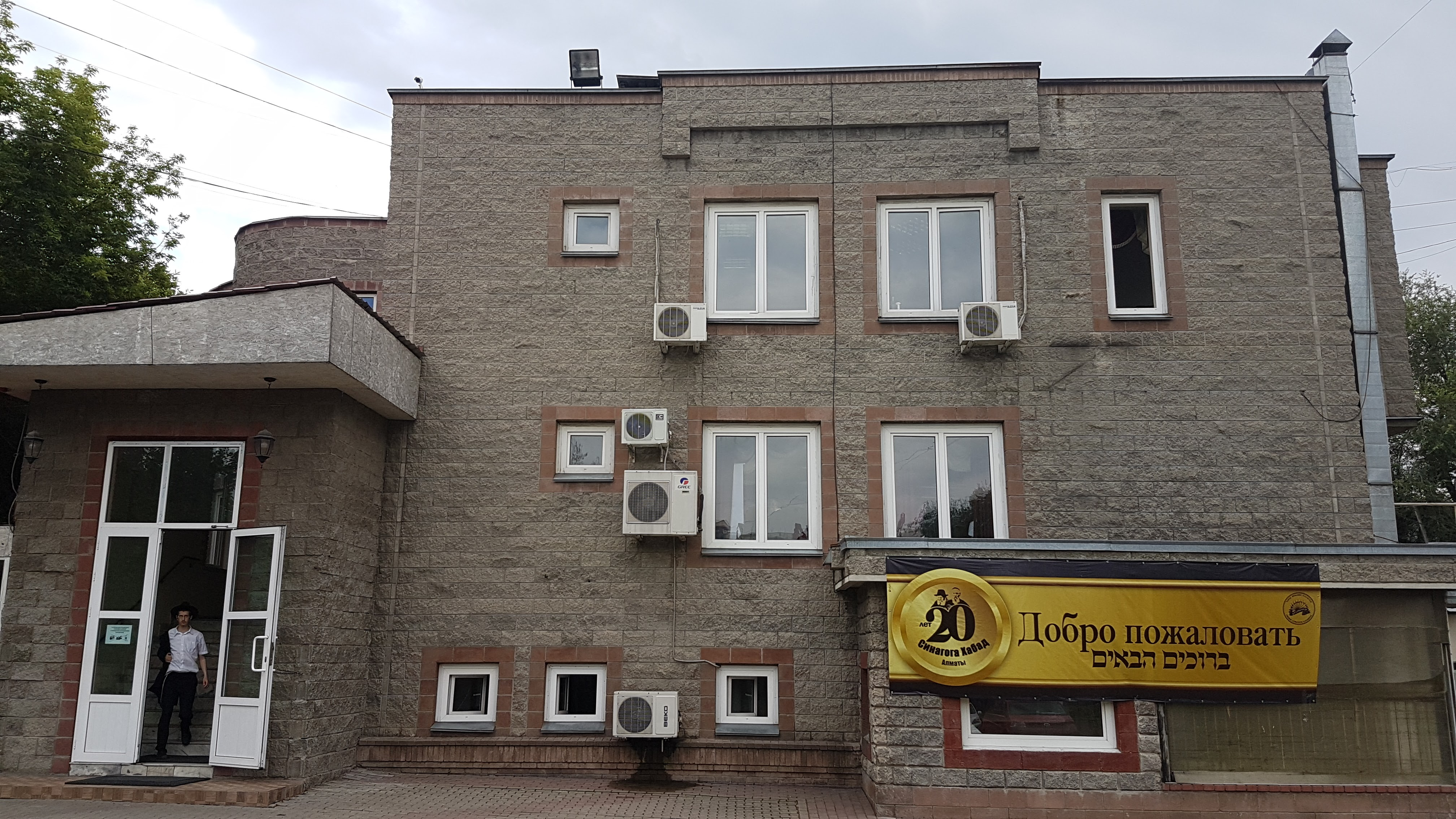 בית חב"ד שמשמש גם כבית הכנסת המרכזי בעיר